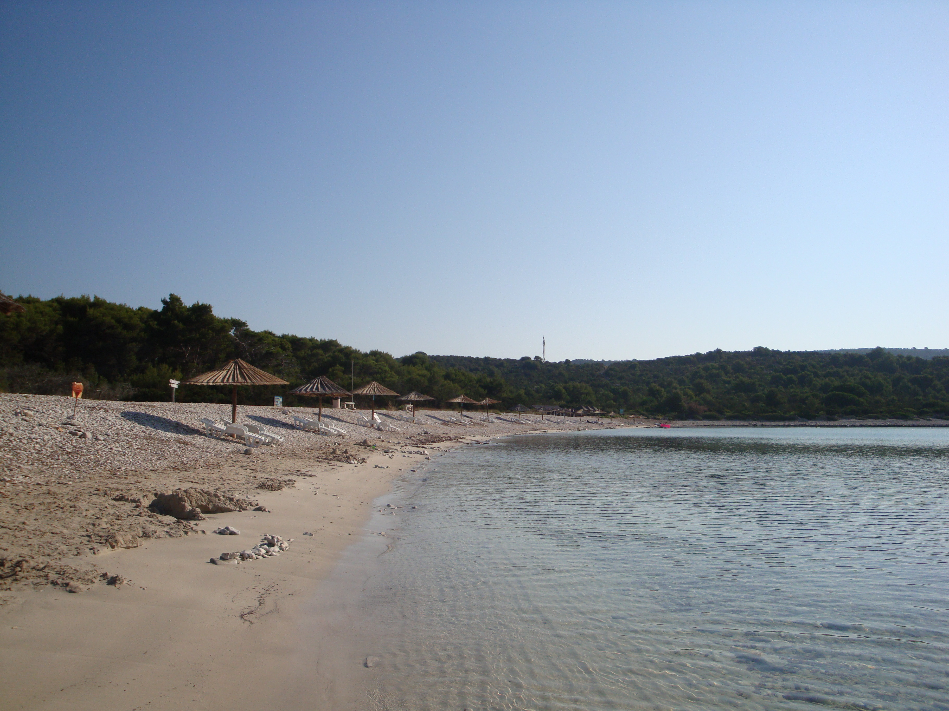 plaža Sakarun, Dugi otok